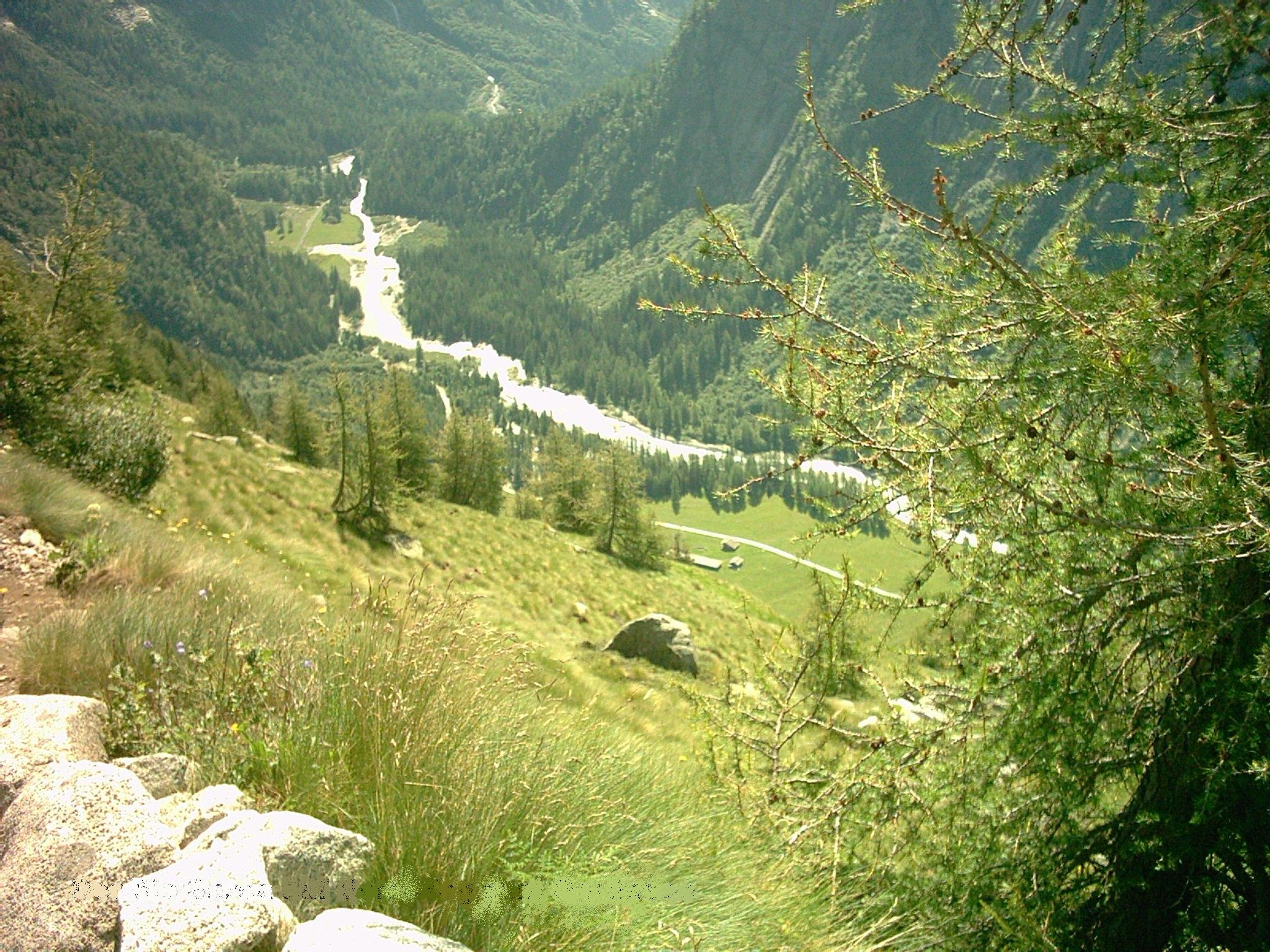 Rio Sarca (Trentino)